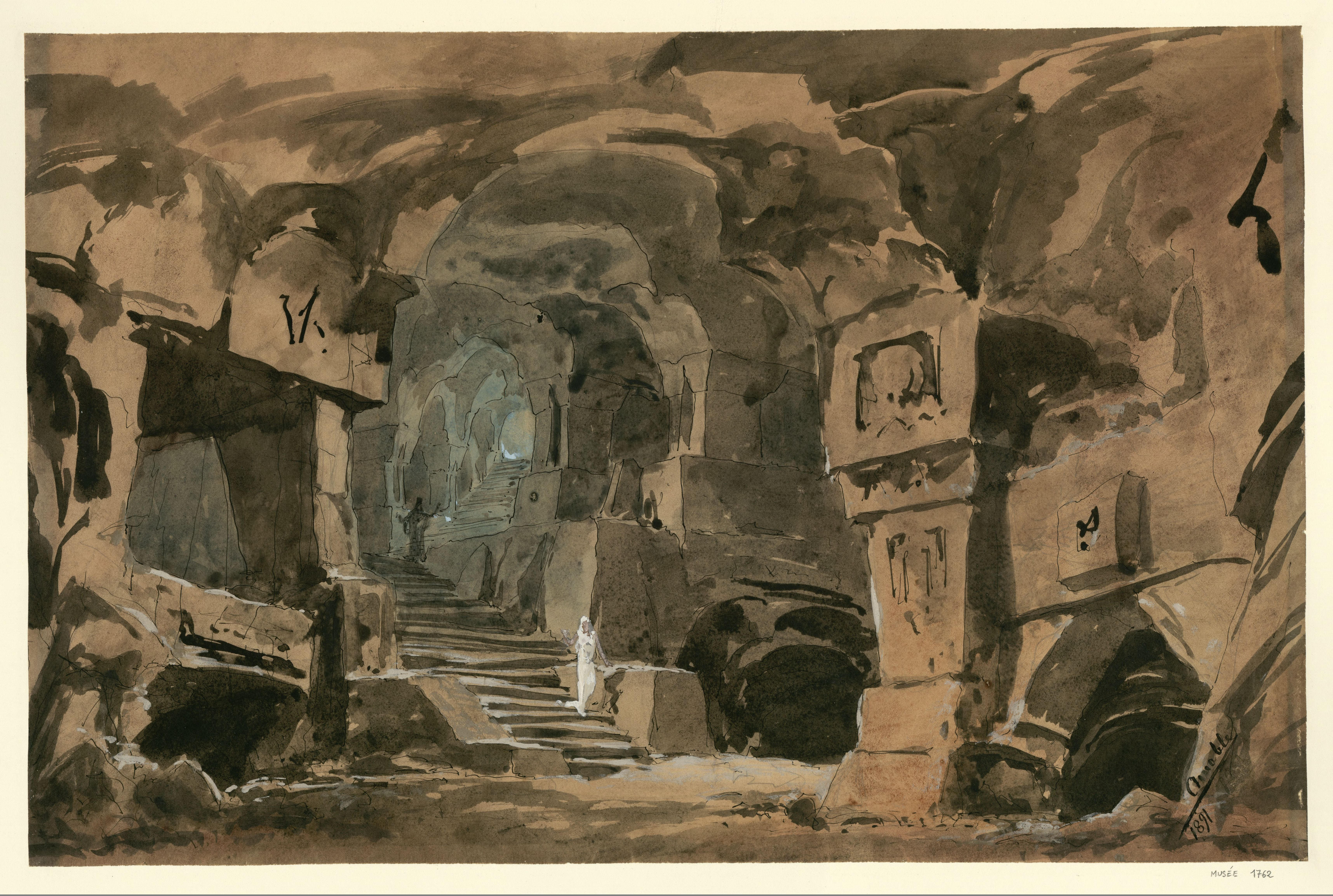 [Le Mage : esquisse de décor de l'acte II, 1er tableau : le souterrain / Amable Le mage : opéra en cinq actes et six tableaux / musique de Jules Massenet. - Paris : Théâtre national de l'Opéra - Palais Garnier, 16-03-1891